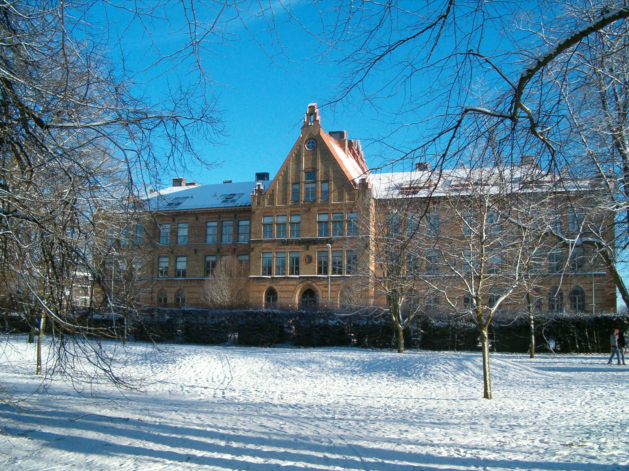 Slottsvångsskolan i Helsingborg i vinterskrud. I denna byggnad huserar även Musikgrundskolan Synkopen.